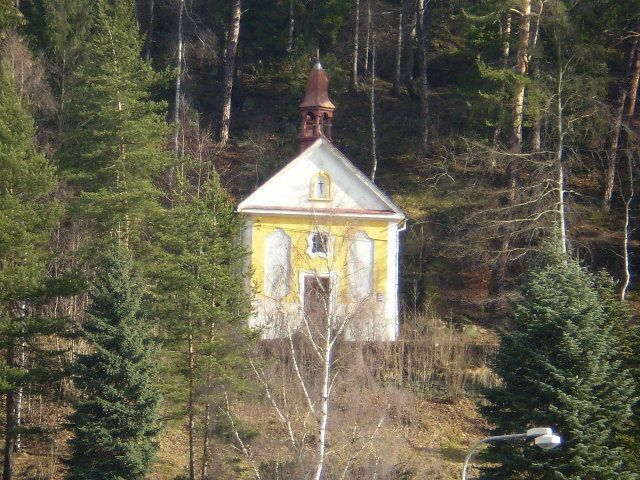 Kaple sv. Barbory v Jáchymově